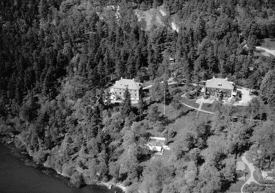 Lilla Korpenhov (Vårbackahemmet), flygfoto över Fittja med Vårby.